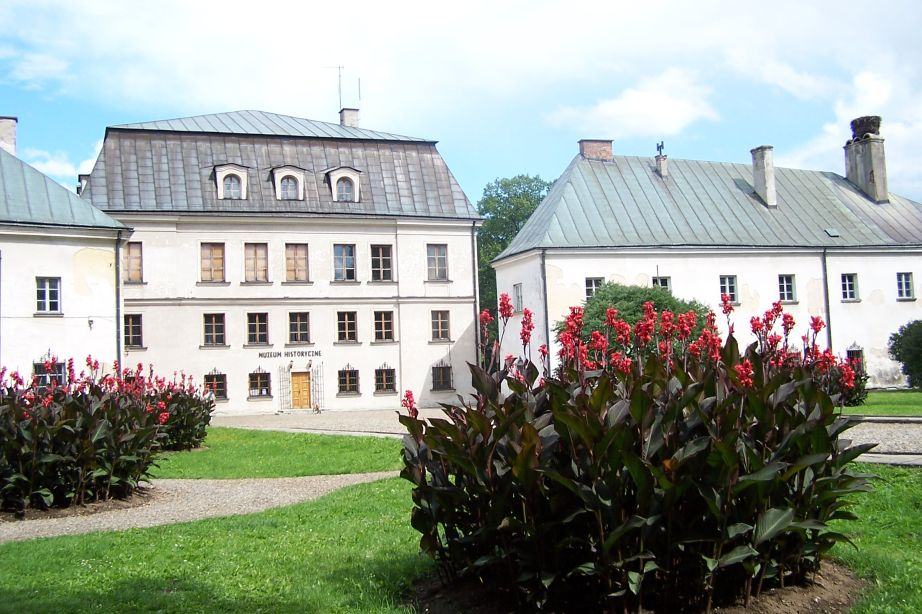 Budynki zespołu pałacowo - parkowego w Dukli